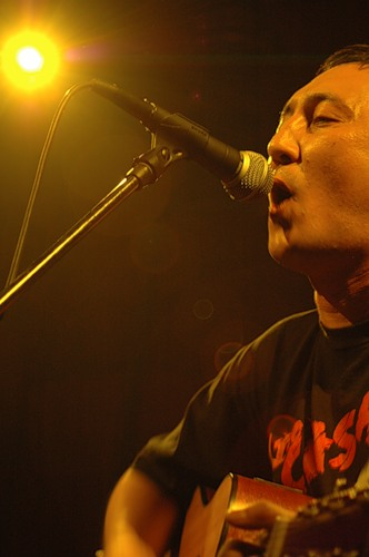 Ермен (гр. Адаптация) на акустическом фестивале "Суховей" (2008г.)